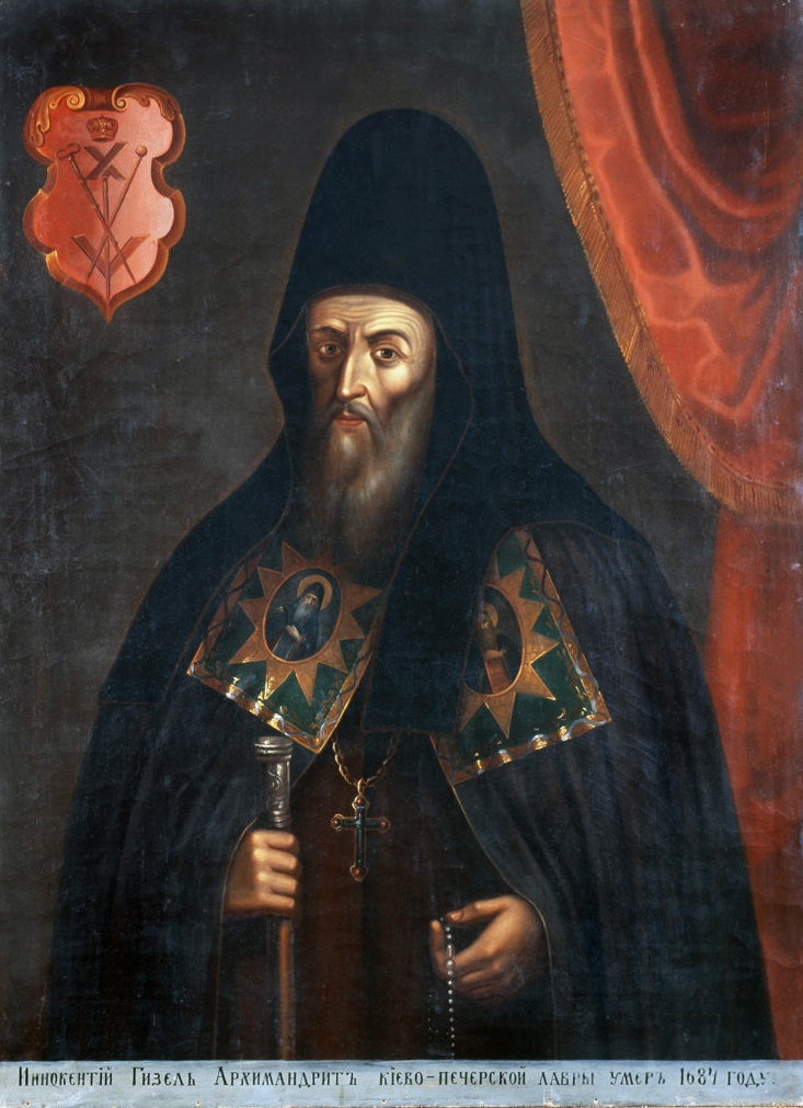 Архимандрит Иннокентий (Гизель). Портрет 1-й половины XVIII в. (НХМУ) Копия с портрета XVII века